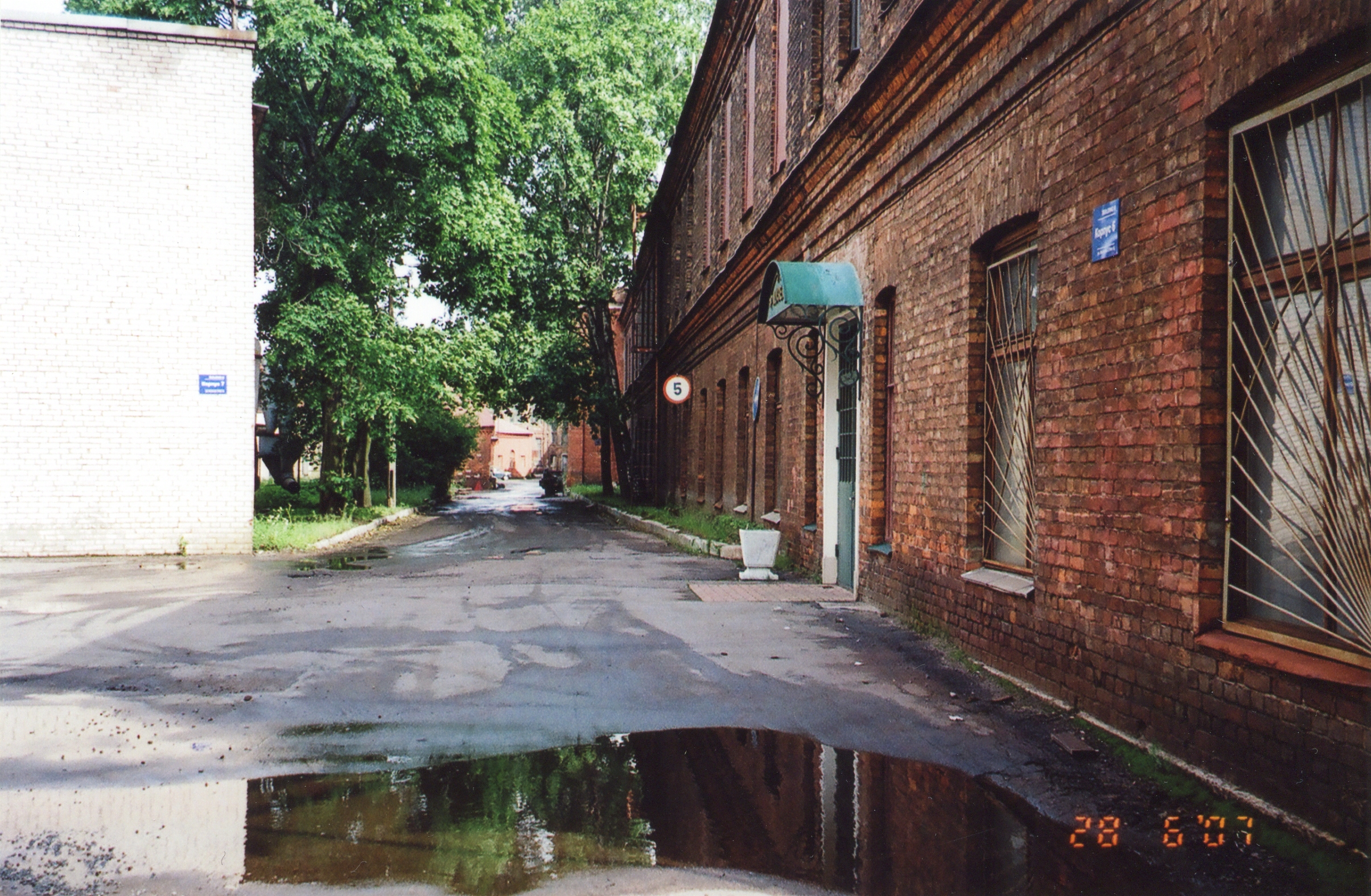 цеха Сестрорецкого инструментального завода